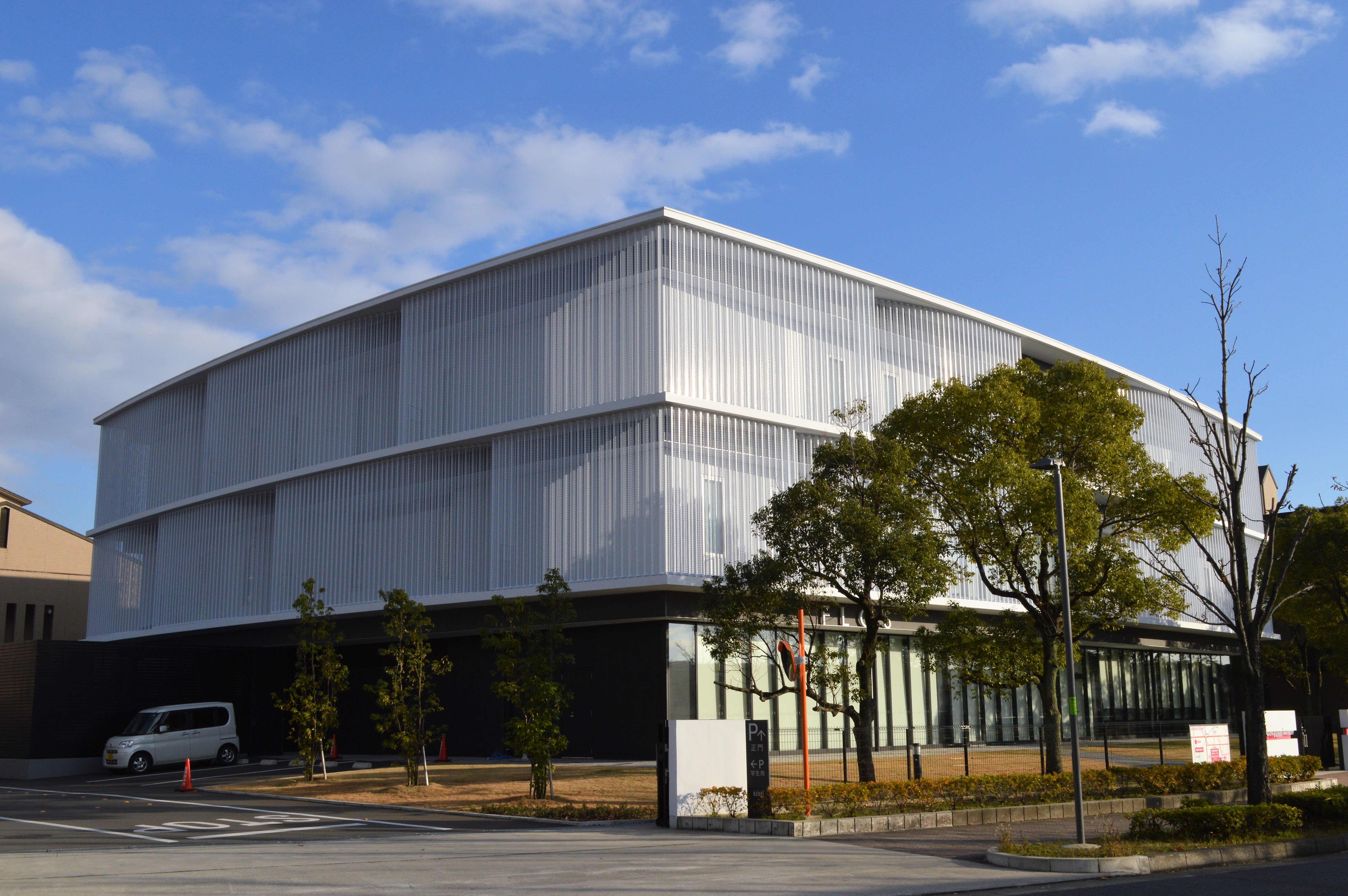 稲沢市の名古屋文理大学。2015年完成のフロース館。